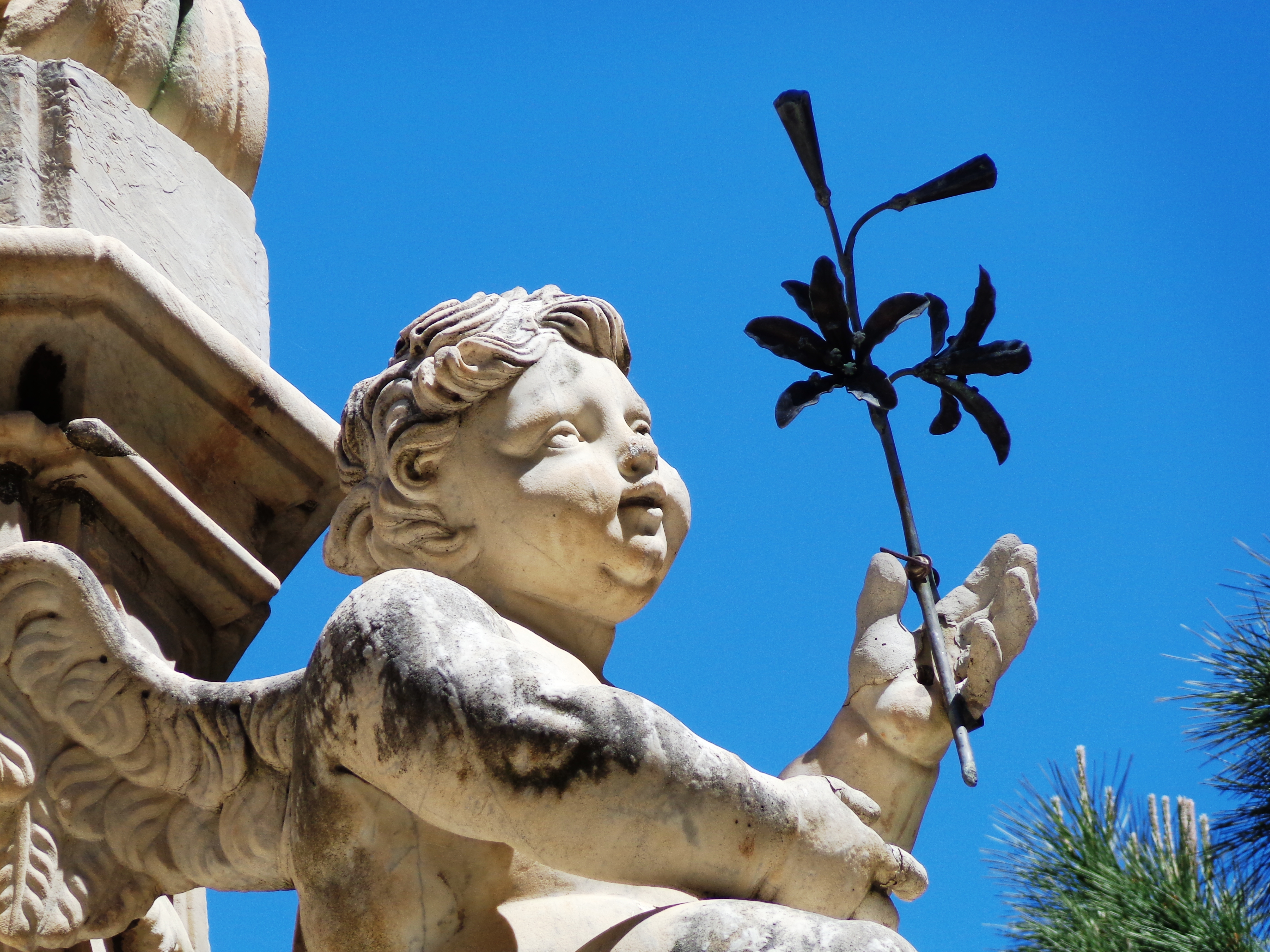 Statua dell'Immacolata (Messina) dettaglio